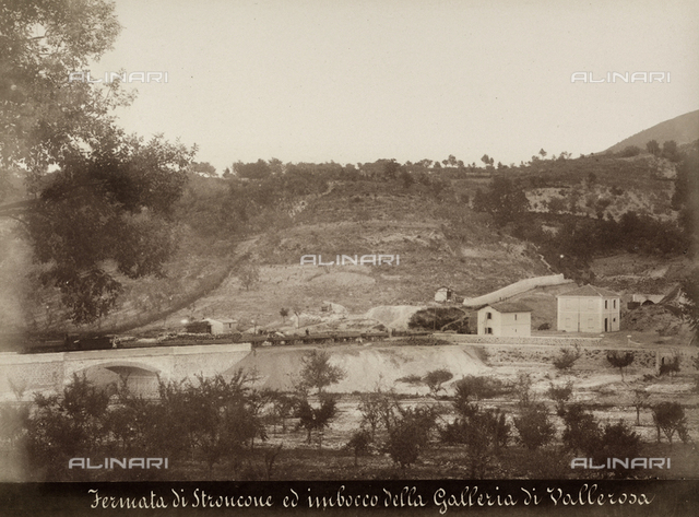 Stazione ferroviaria di Stroncone e imbocco della galleria di Vallerosa. Immagine tratta dalla raccolta di fotografie sulla costruenda ferrovia Terni-Rieti, realizzata da Achille Mauri per conto della "Società Italiana per le Strade Ferrate Meridionali" e pubblicata nell'ottobre 1883.